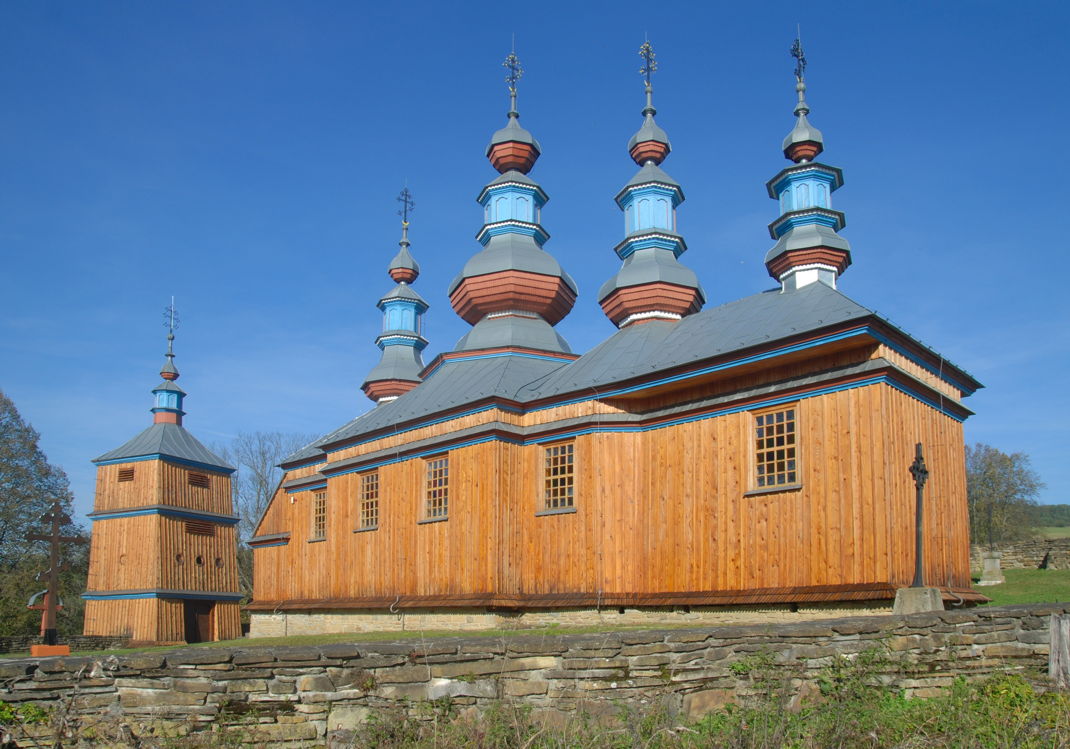 wieś Komańcza